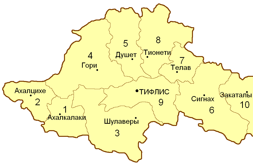 Карта административного деления Тифлисской губернии